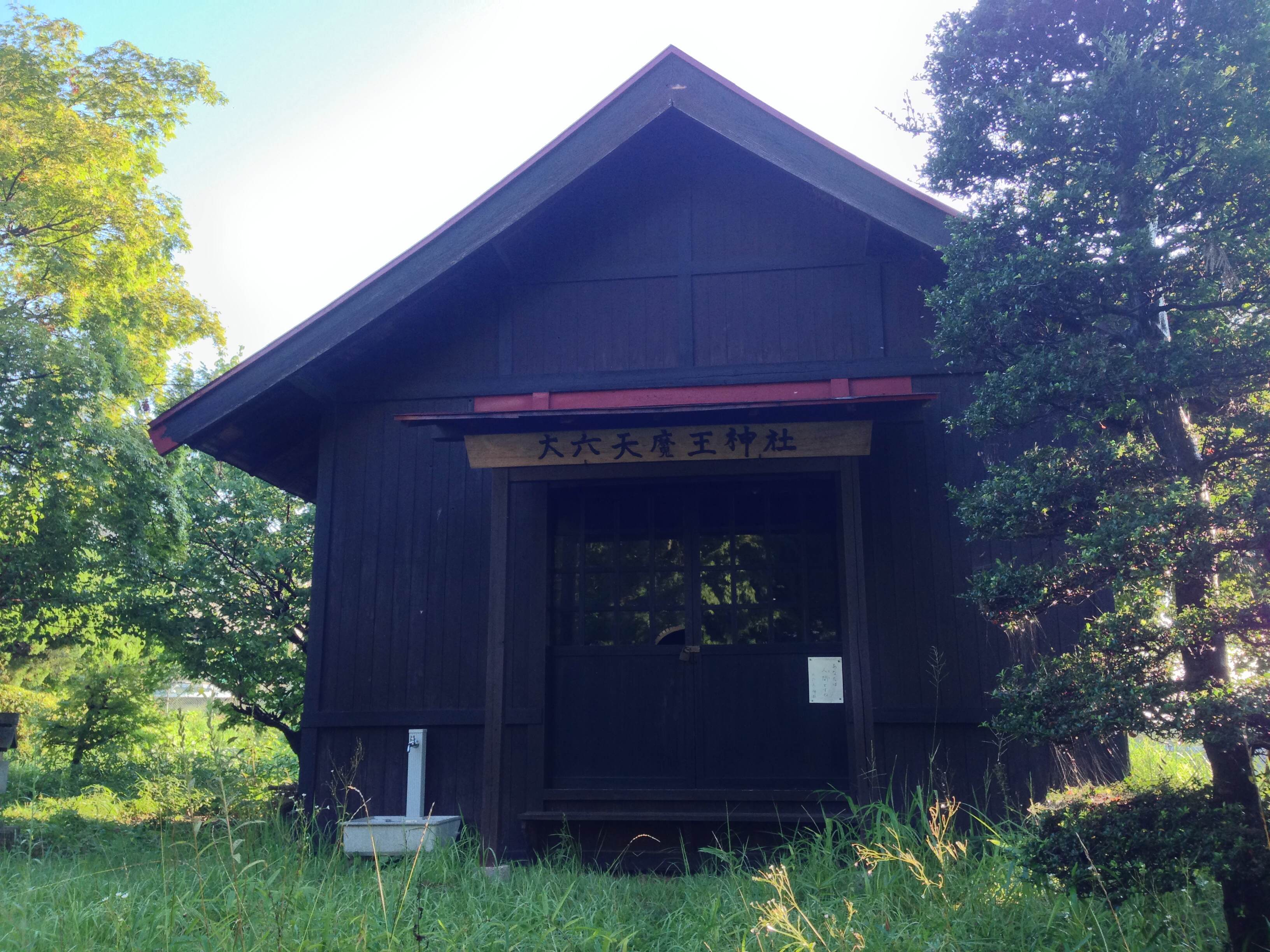 東京都八王子市元八王子町にある大六天魔王神社。第六天や大六天の名が残っている神社はいくつもあるが、「魔王」の名が残っている神社は珍しい。